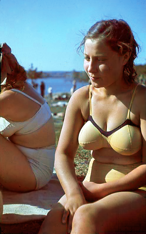 Ukrainerinnen beim Sonnenbaden Sommer 1942